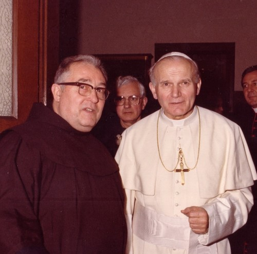 Papa alla Pontificia Accademia Mariana Internazionale